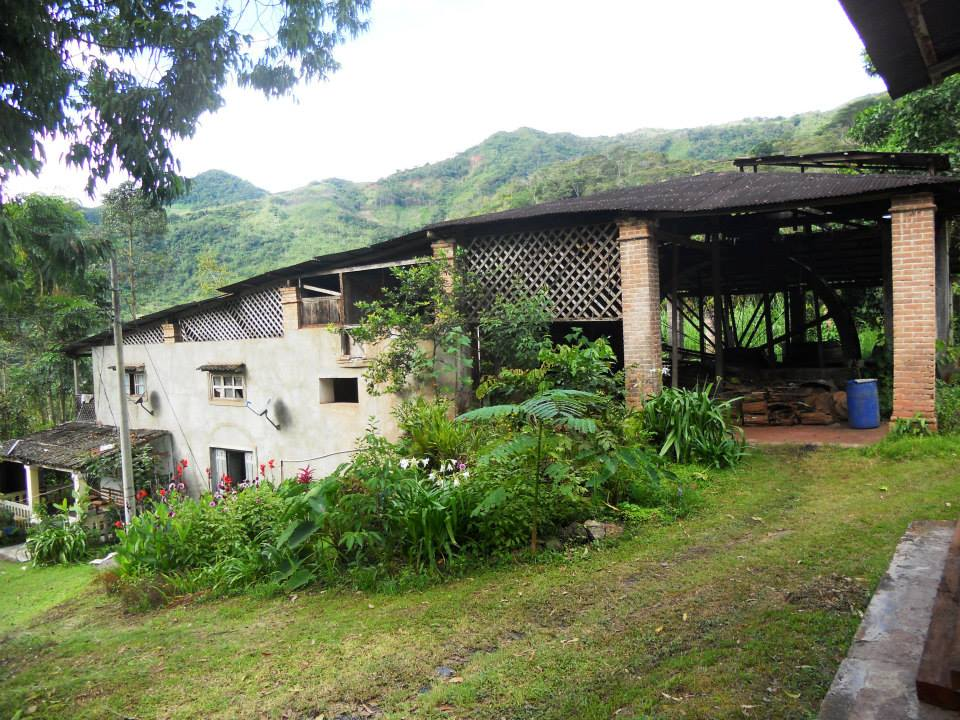 Típica hacienda de caña de azúcar en Monobamba